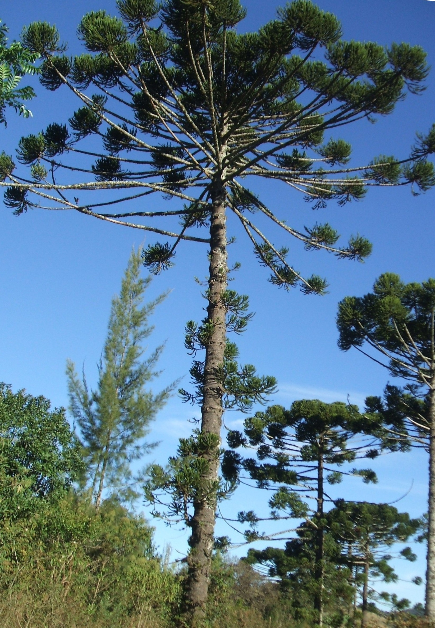 Foto de um espécime de Pinheiro do Paraná - Araucaria angustifolia tirada no município de Maria da Fé - Brasil